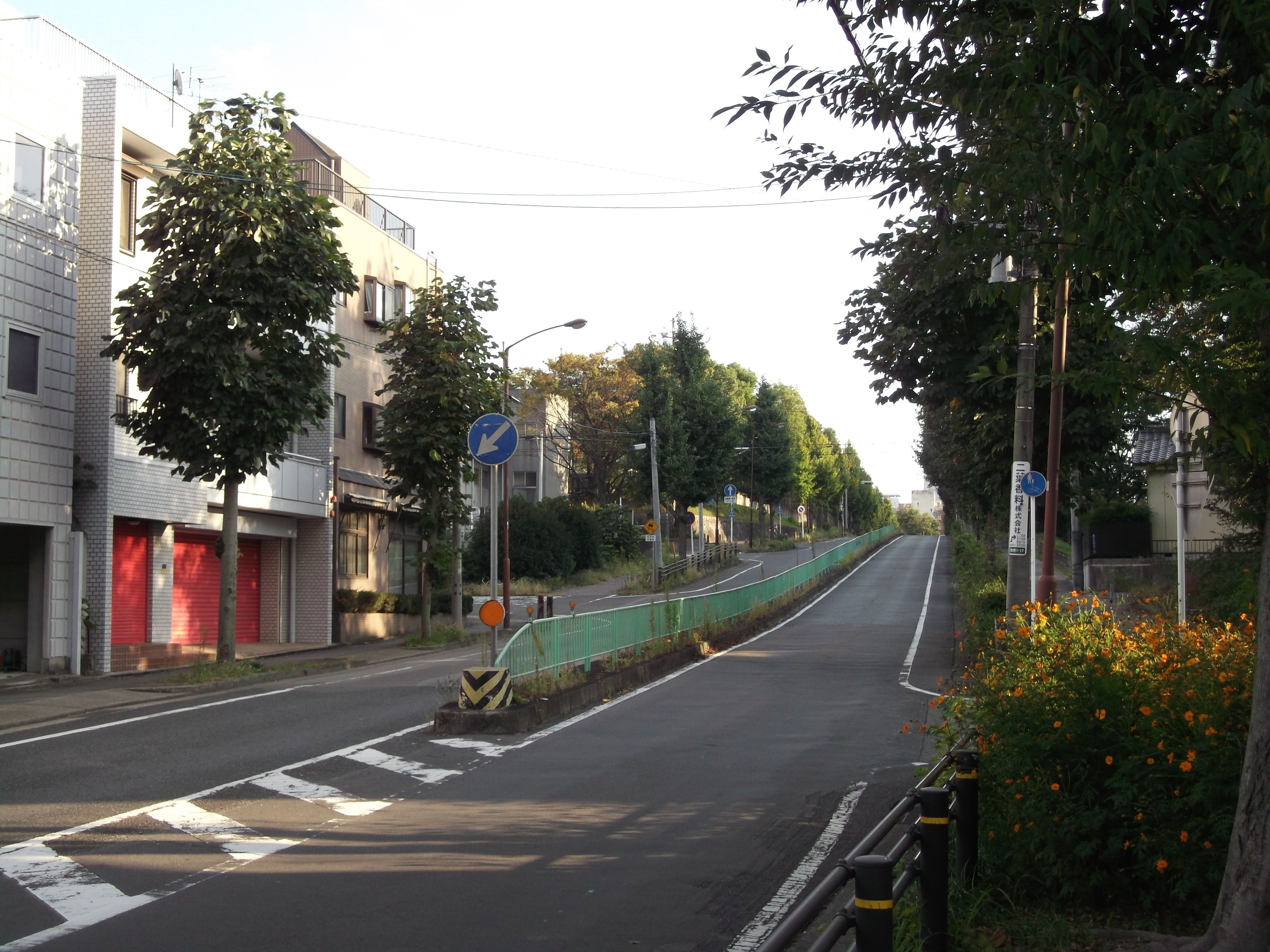 名古屋市北区・東区区界付近にある枳殻坂（きこくざか）を北西側より撮影